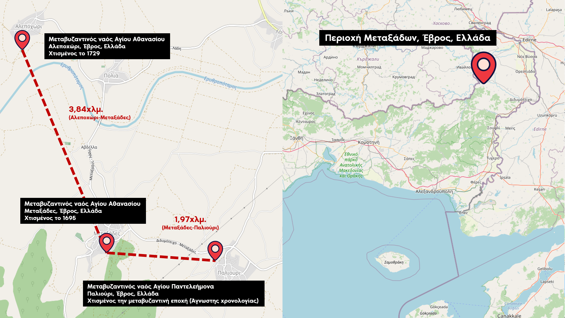 Χάρτης μεταβυζαντινών ναών στην περιοχή Μεταξάδων GR 2